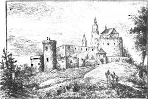 Zamek Chojnik - litografia z poczatku XIX wieku